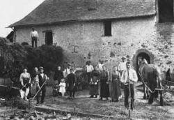 Scène de battage en Bretagne, Ferme du Grand Cordel à Rennes en 1910.